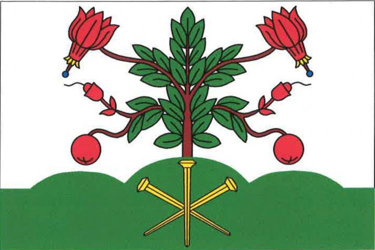 Kalek, vlajka. List tvoří dva vodorovné pruhy, bílý a zelený, v poměru 4 : 1. Z druhé až jedenácté dvanáctiny horního okraje zeleného pruhu vyniká zelené trojvrší se třemi žlutými zkříženými kovanými hřeby s hroty u dolního okraje listu. Z prostředního vyššího vrchu vyrůstá klikva bahenní. Poměr šířky k délce listu je 2 : 3.